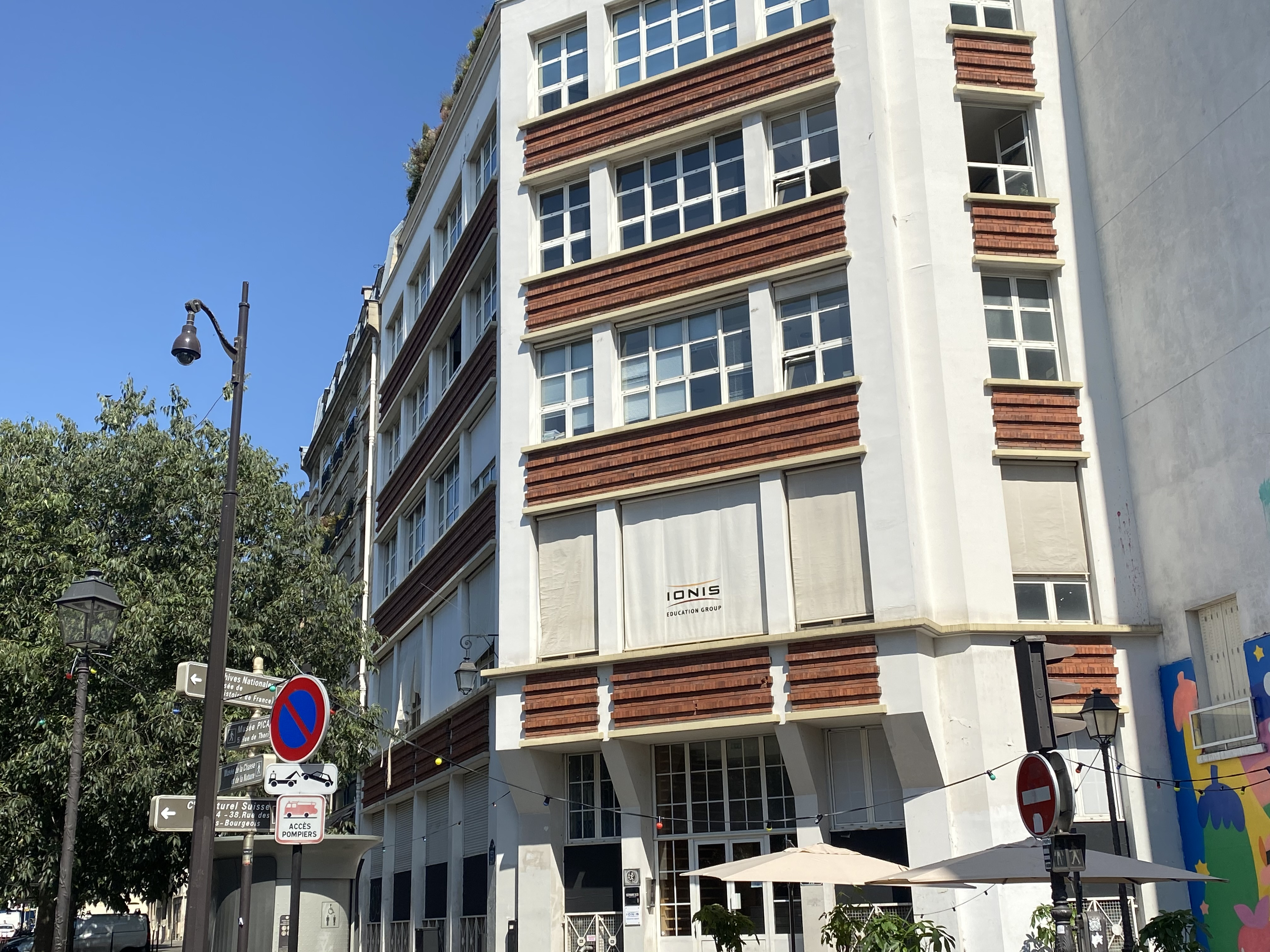 Siège social du groupe IONIS 2 rue des Quatre-Fils à Paris